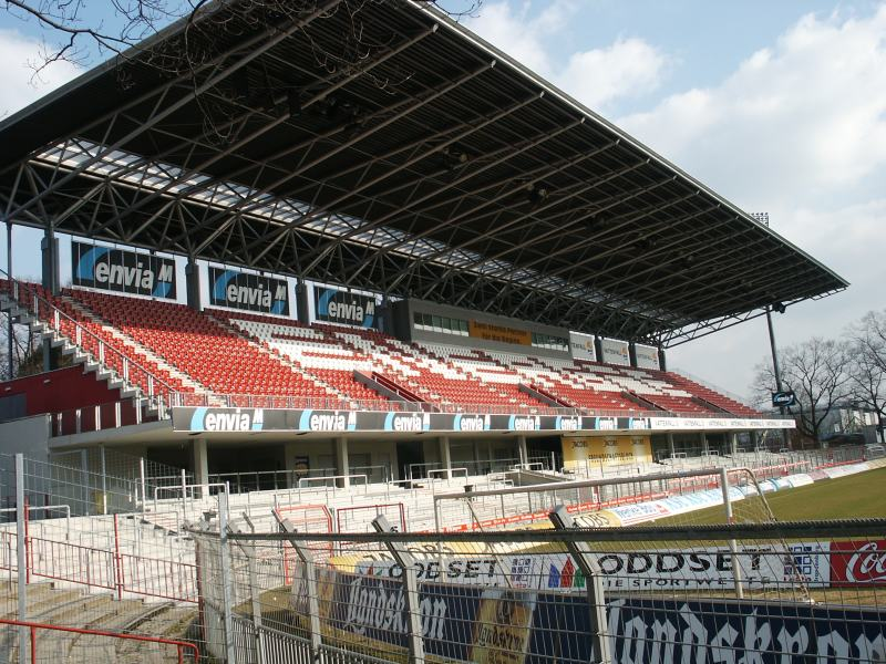 Description in de wikipedia Beschreibung: Stadion der Freundschaft in Cottbus Quelle: selbst erstellt Fotograf: Sascha Nehls Datum: 8.März 2004 Lizenz: GNU Freie Dokumentationslizenz